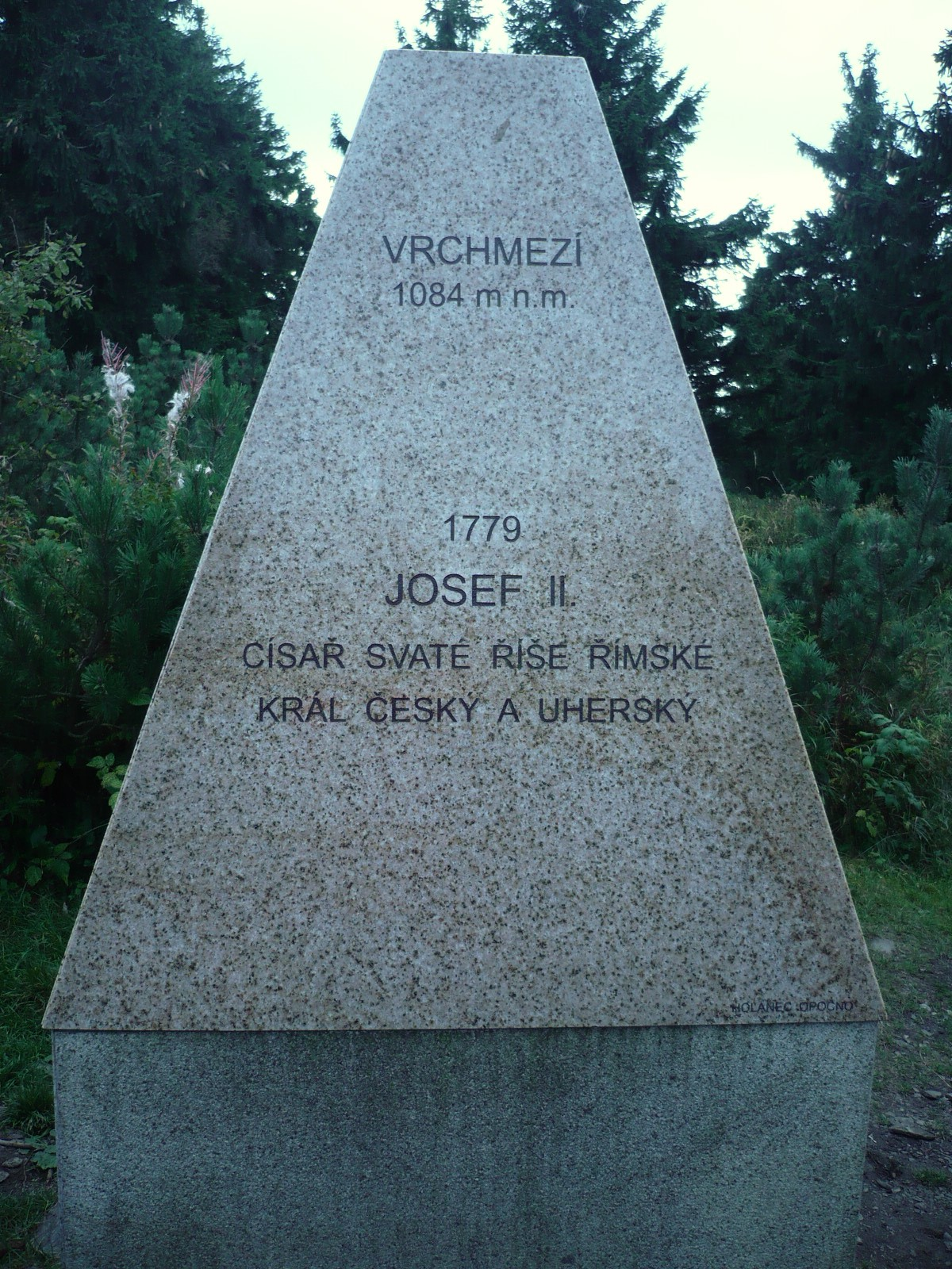 Orlica. Pomnik